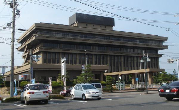 Kakamigahara City Hall in Gifu Preferture, Japan